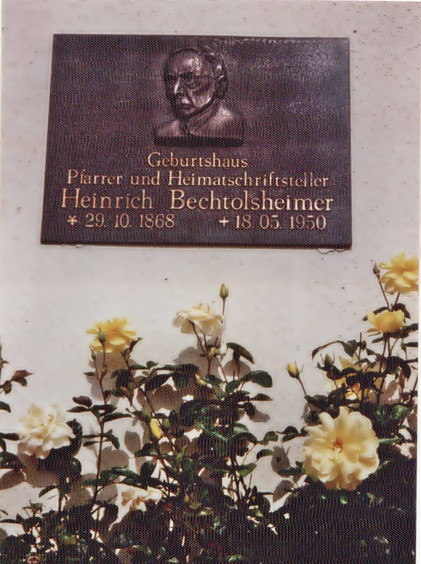 Heinrich Bechtolsheimer Gedenktafel Geburtshaus in Wonsheim, Rheinhessen